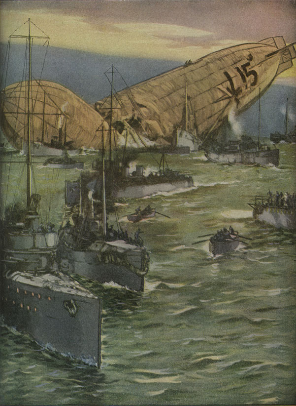 L 15 nødlandet i Kentish Knock-dybet på slæb mod Westgate